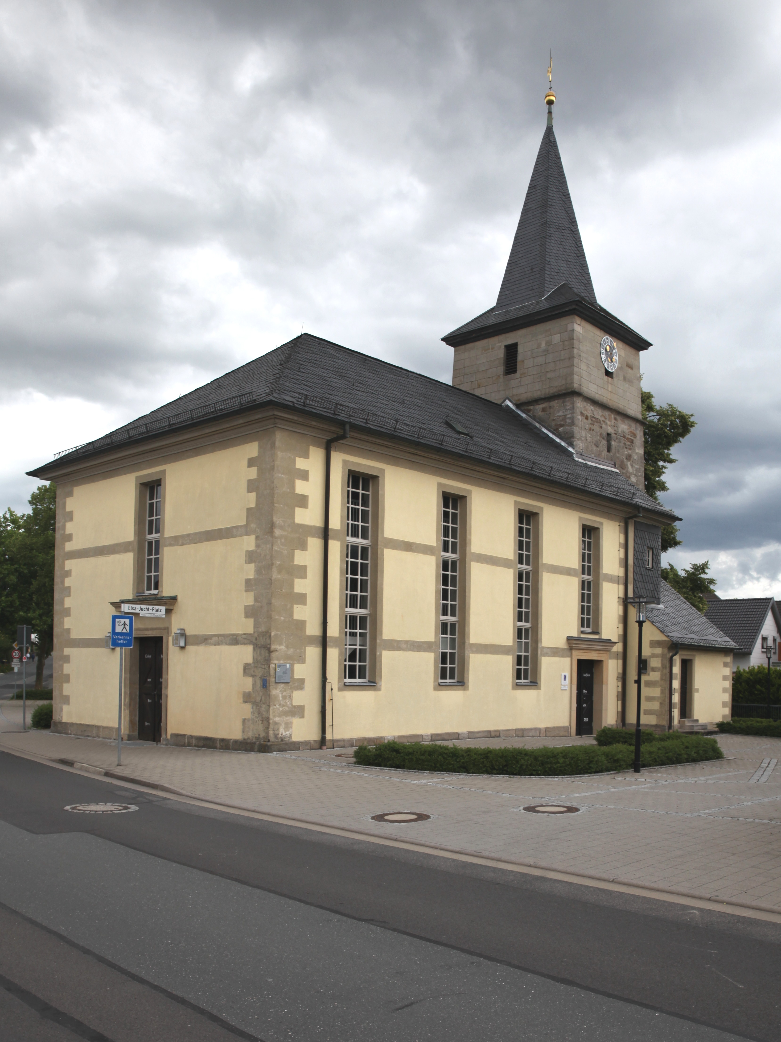 Evangelisch-lutherische Pfarrkirche in Scheuerfeld, Coburg